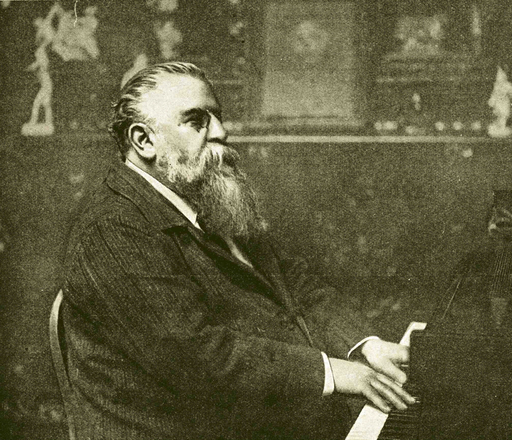 Le pianiste français Raoul Pugno